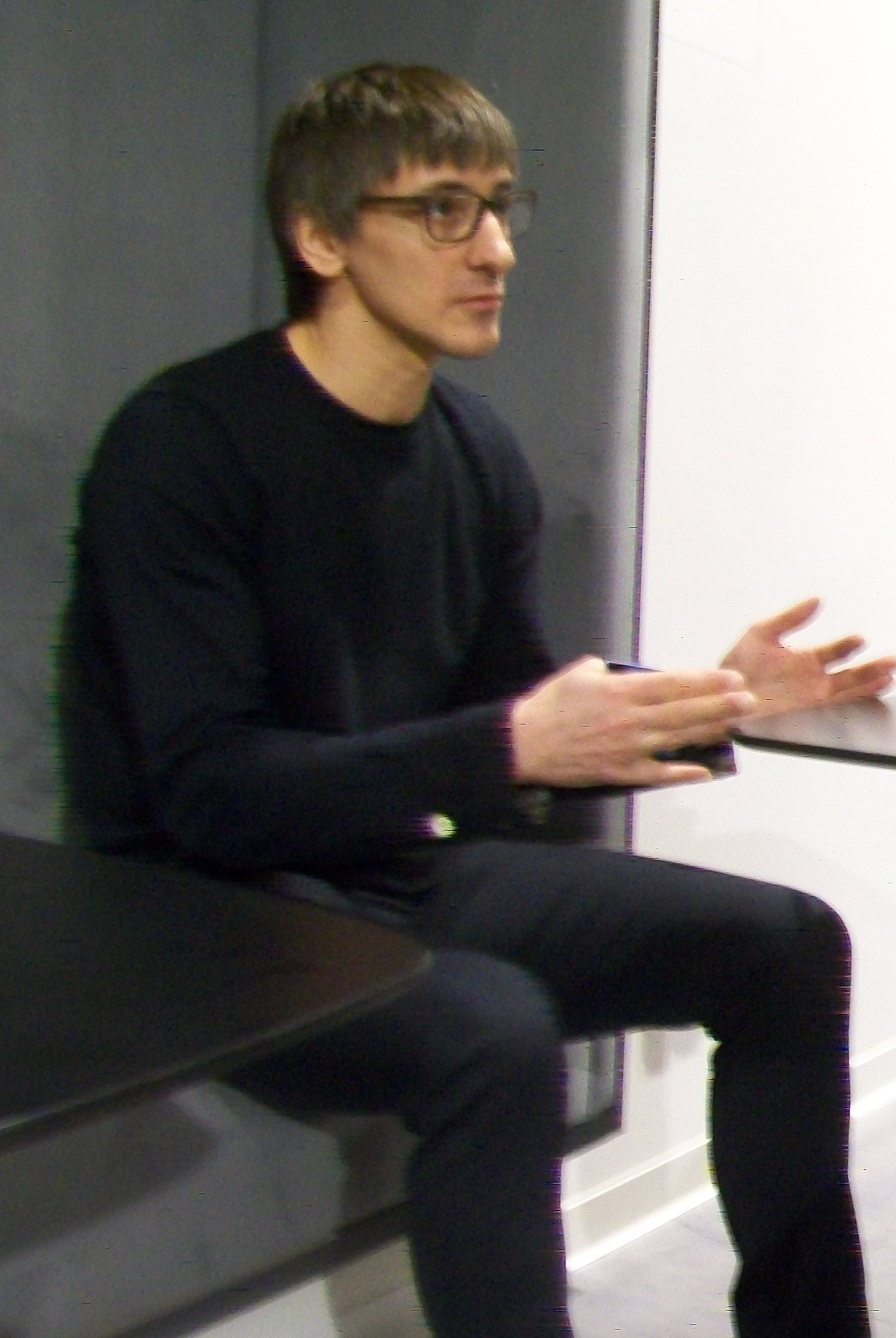 Михаил Фишман в Ельцин-центре